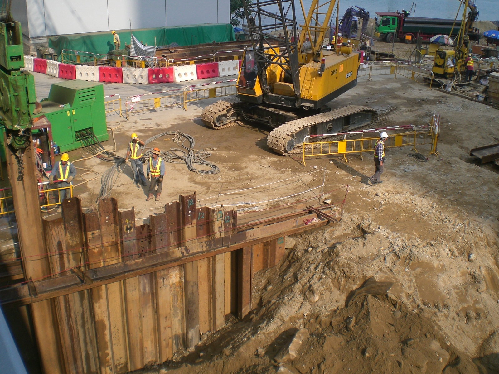 中環及灣仔填海計劃建築工地